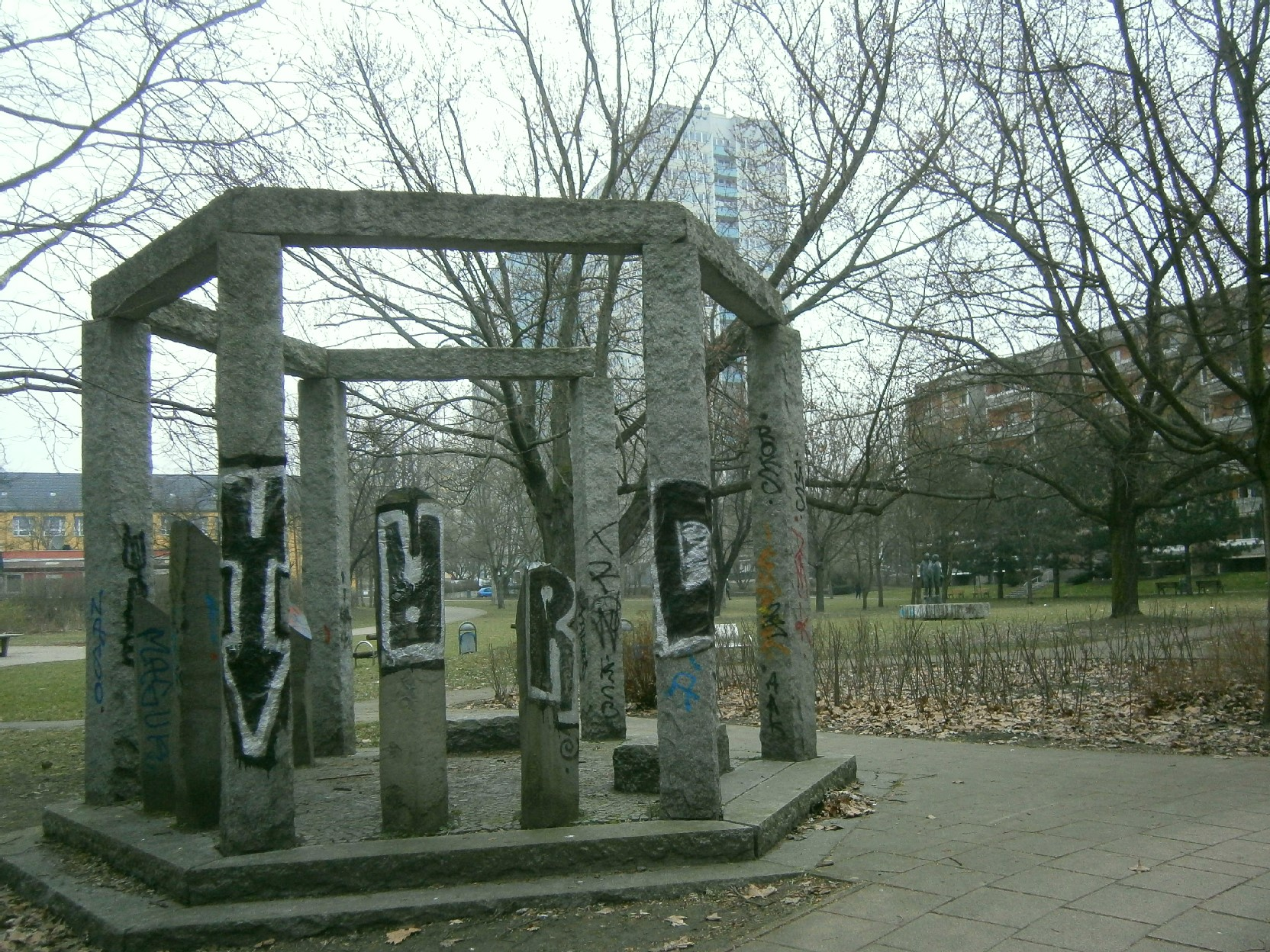 Der Hönower Weg ist einer der 20 grünen Hauptwege Berlins. Er führt vom Volkspark Friedrichshain zunächst durch den Bezirk Prenzlauer Berg. Er verläuft insbesondere zwischen Storkower Straße und Hanns-Eisler-Straße über den Pieskower Weg und durch den Einsteinpark. Hier der Pavillon im Park: der Einstein-Pavillon.